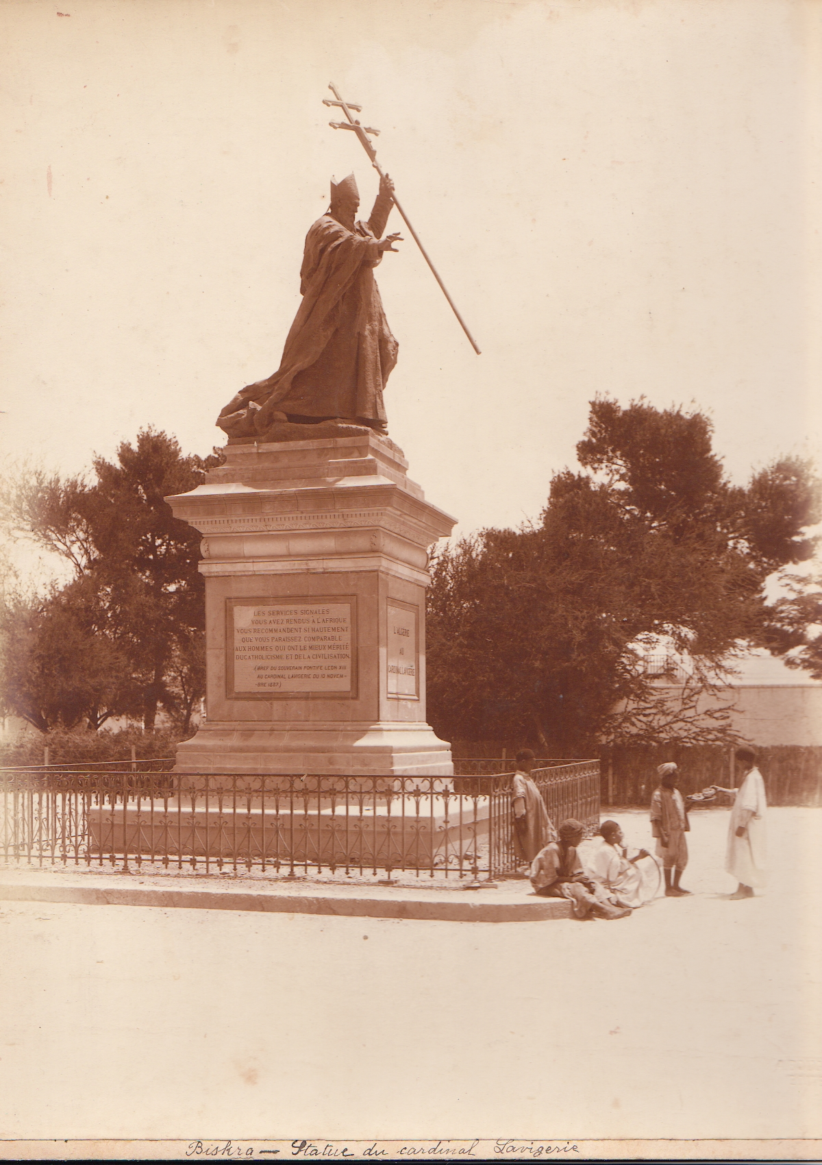 Photographie du monument au Cardinal Charles Lavigerie, bronze par Alexandre Falguière. Vers 1900, cliché original 22 x 29 cm, collection privée. Photographe Alexandre Bougault (père ou fils ?). La statue a été déplacée de nos jours dans le parc des ateliers municipaux. Le même monument (plaques différentes) existe à Bayonne.